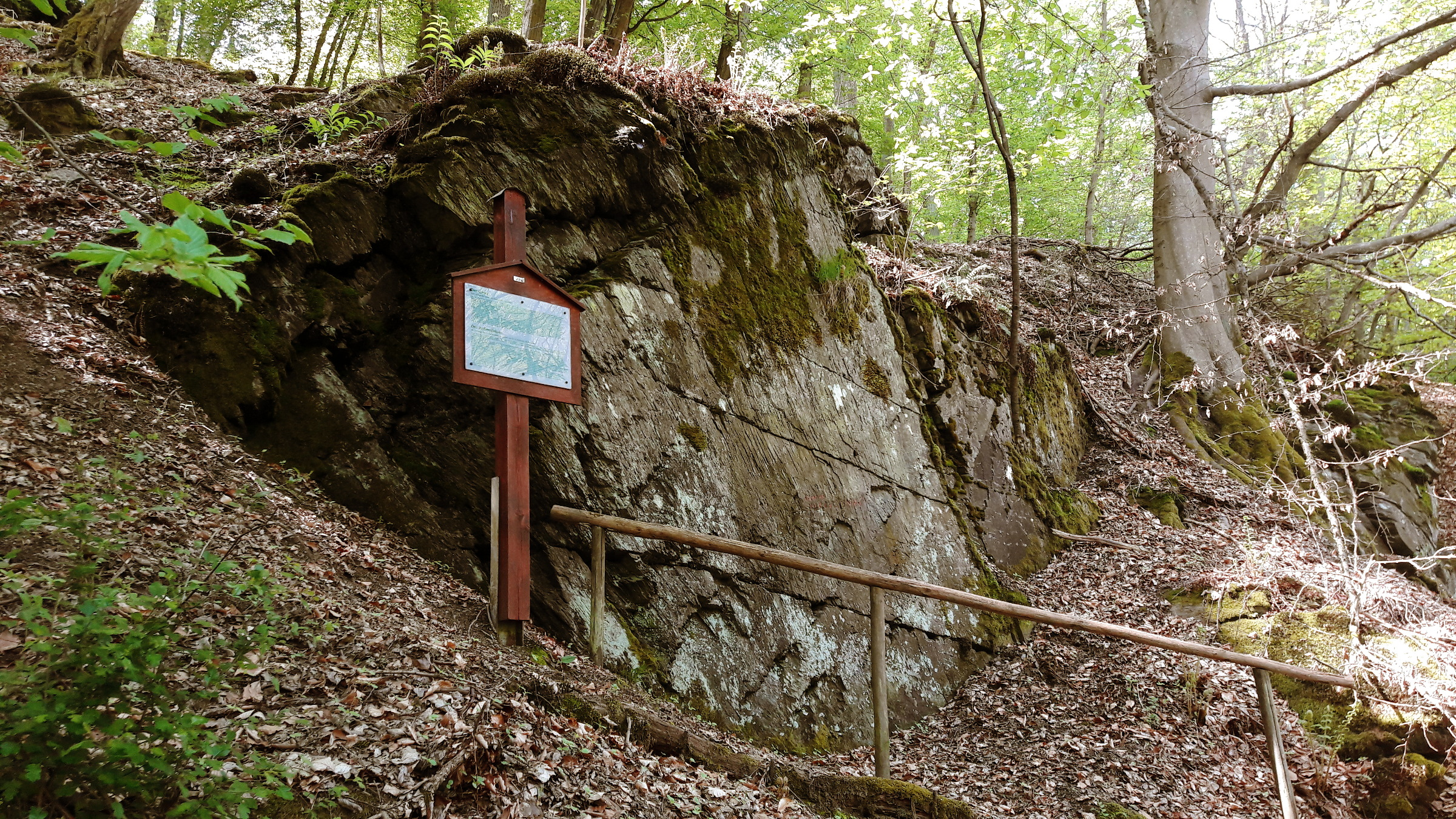 Gesamtansicht des Justinusfelsens im Aartal bei Lindschied